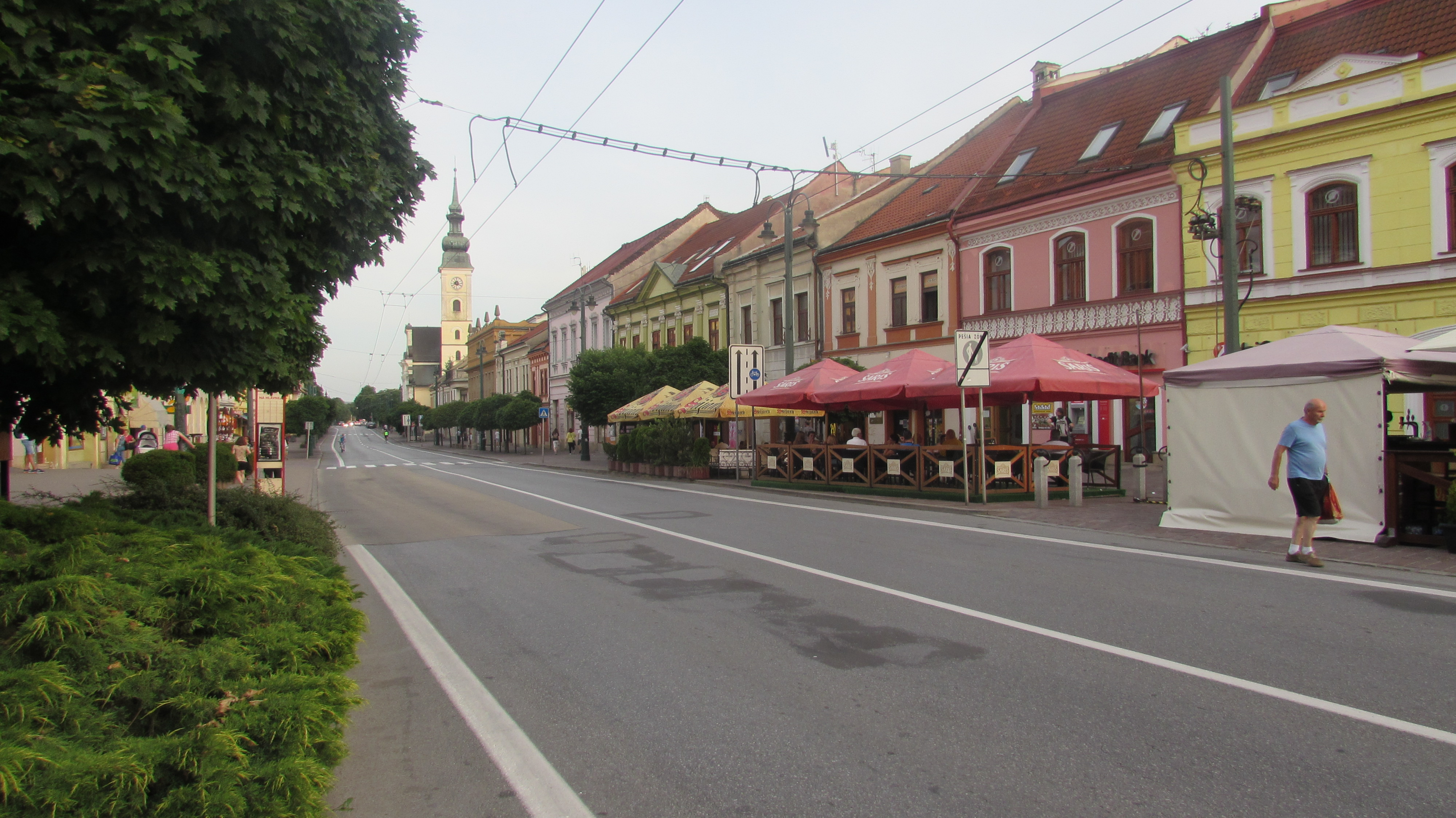 Presov Strasse